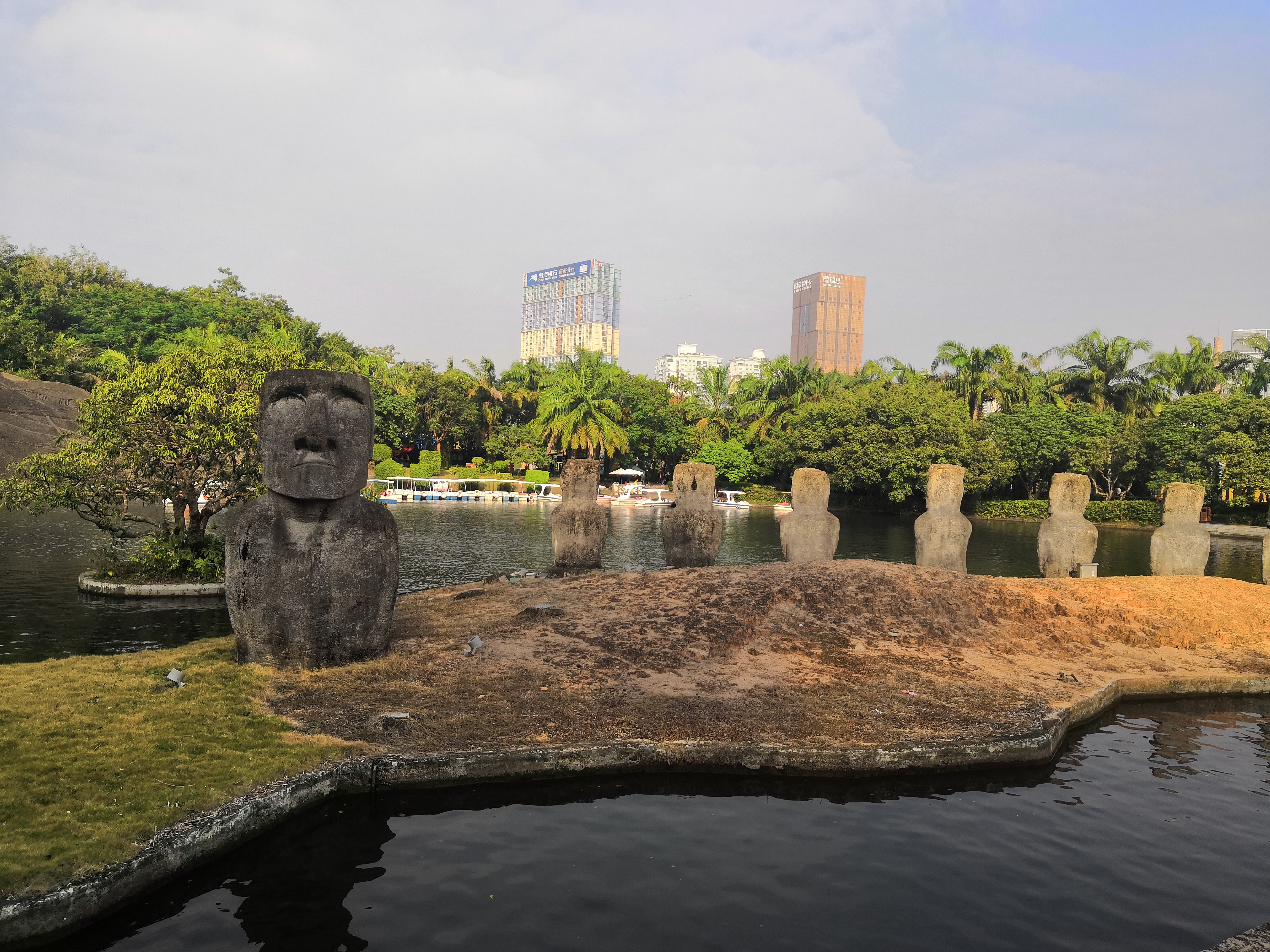 中文（中国大陆）: 深圳 世界之窗